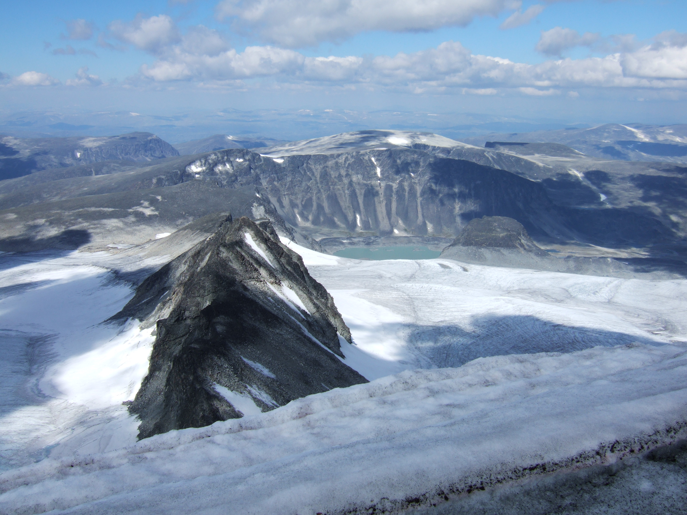 Trollsteineggje sett fra Glittertinden, Dovrefjell